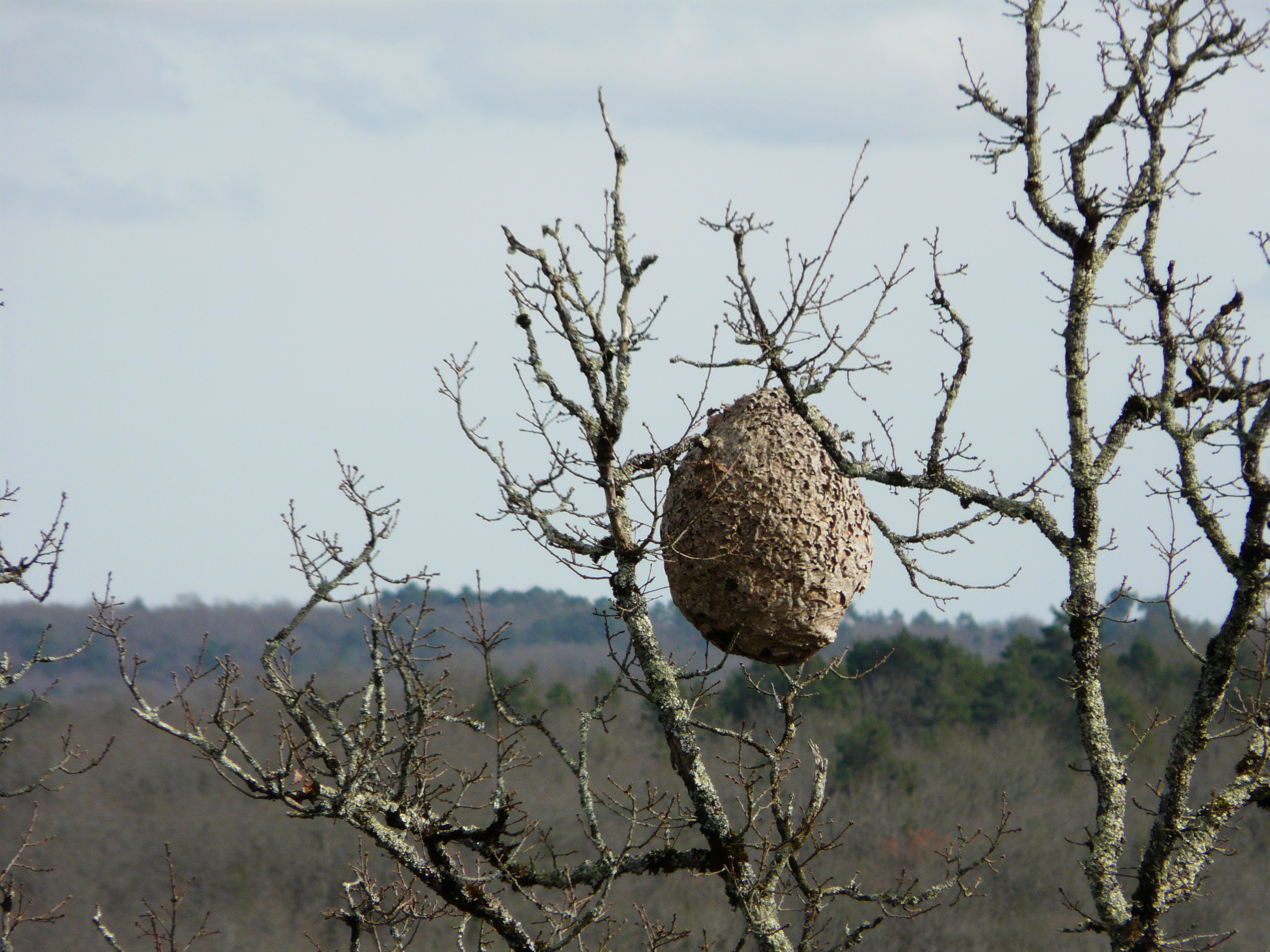 Nid de frelons asiatiques (Vespa velutina), Mayac, Dordogne, France